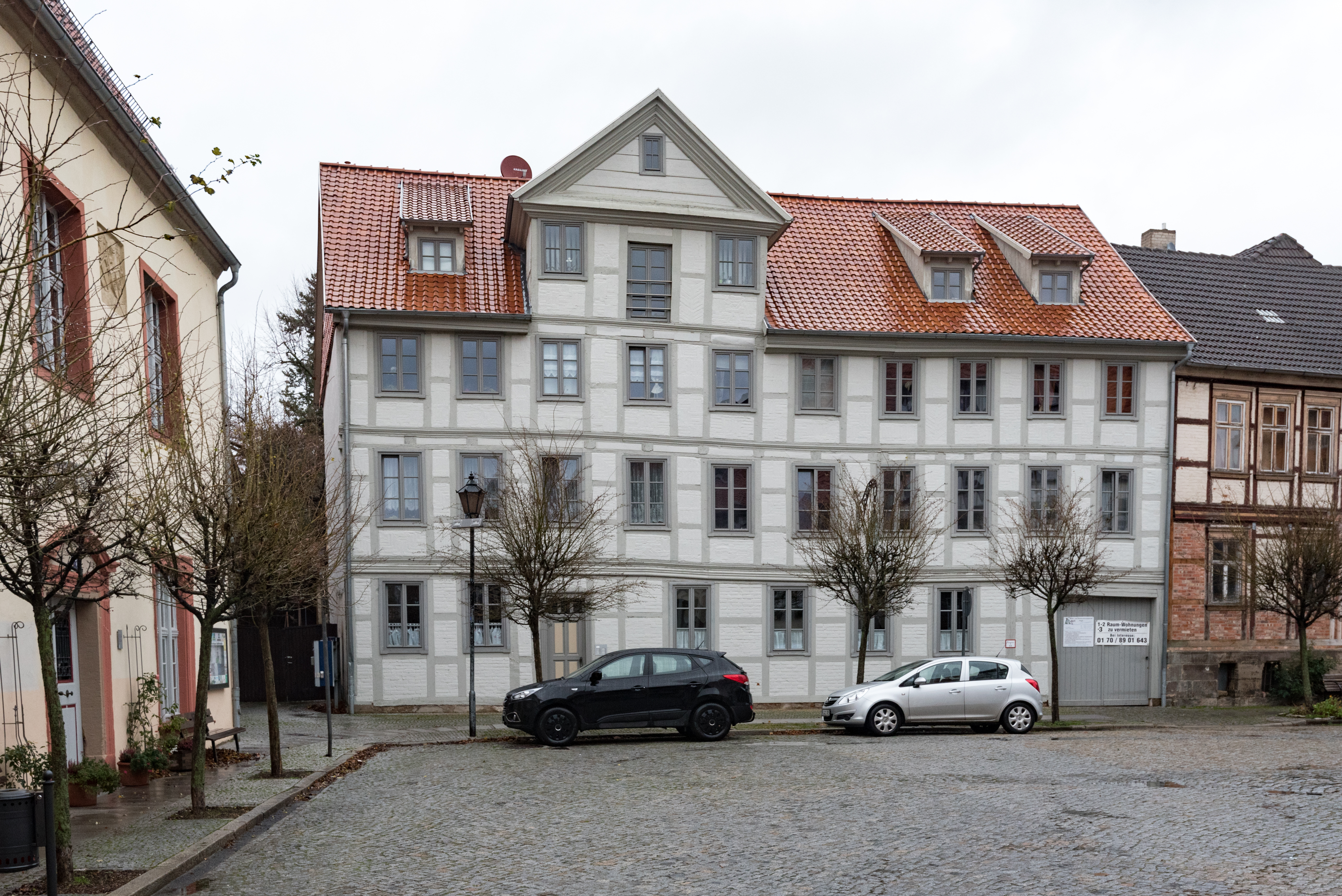 Osterwieck, Am Markt 2